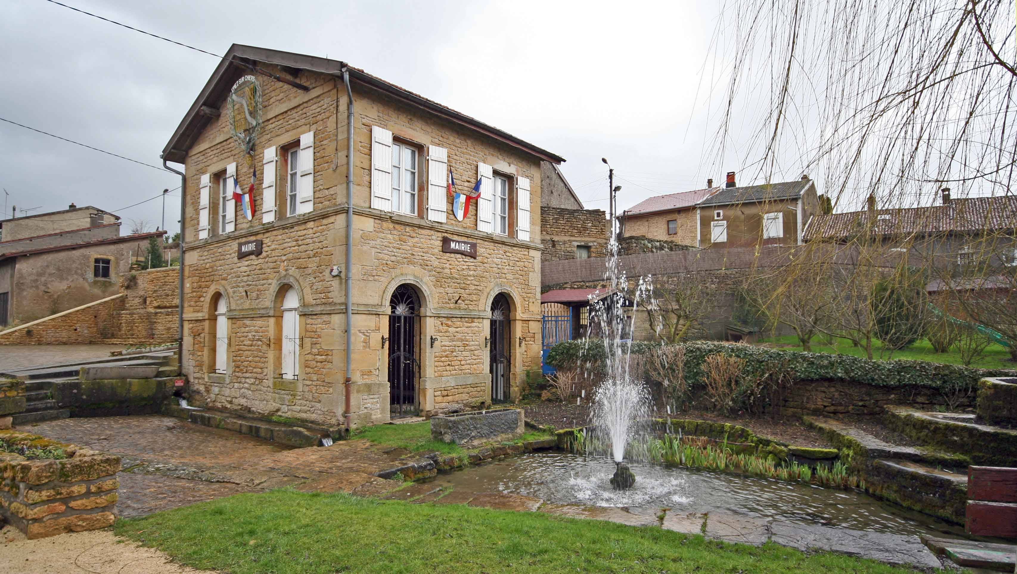 Epiez-sur-Chiers.